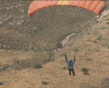 זאב אינגבר ברחיפת הגובה הראשונה בישראל, באתר מבוא חמה, ביום 2.5.1987